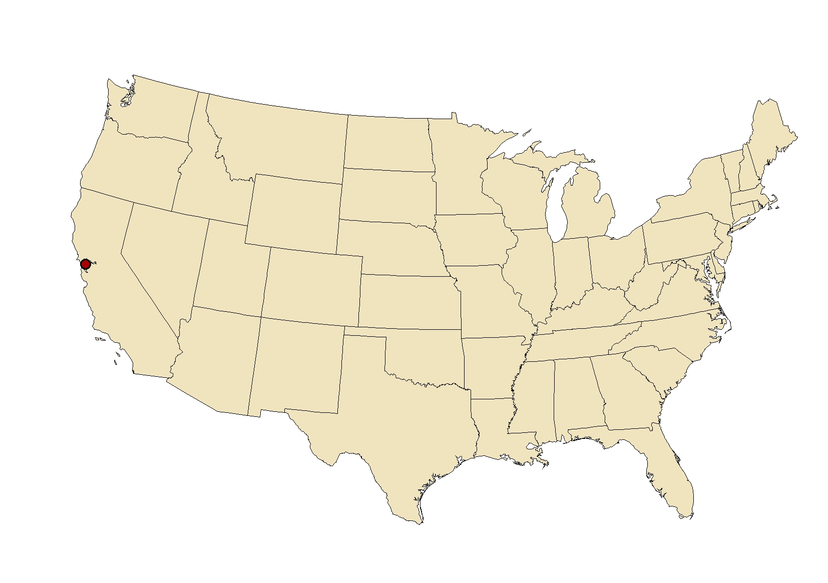 Map of Berkeley